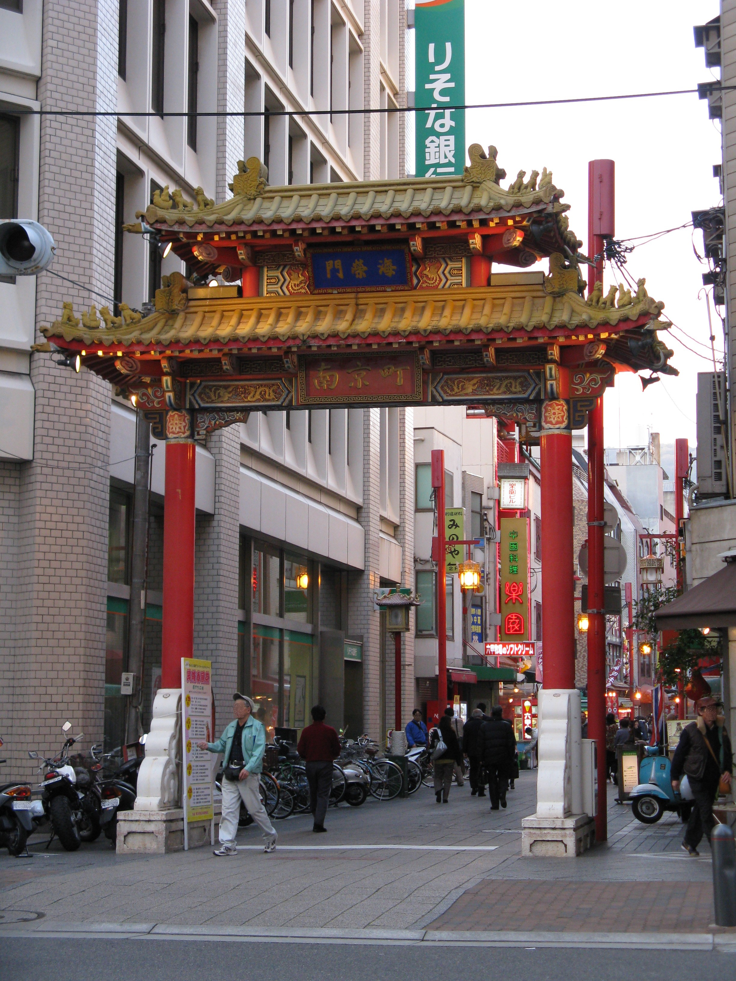 神戸南京町・海栄門